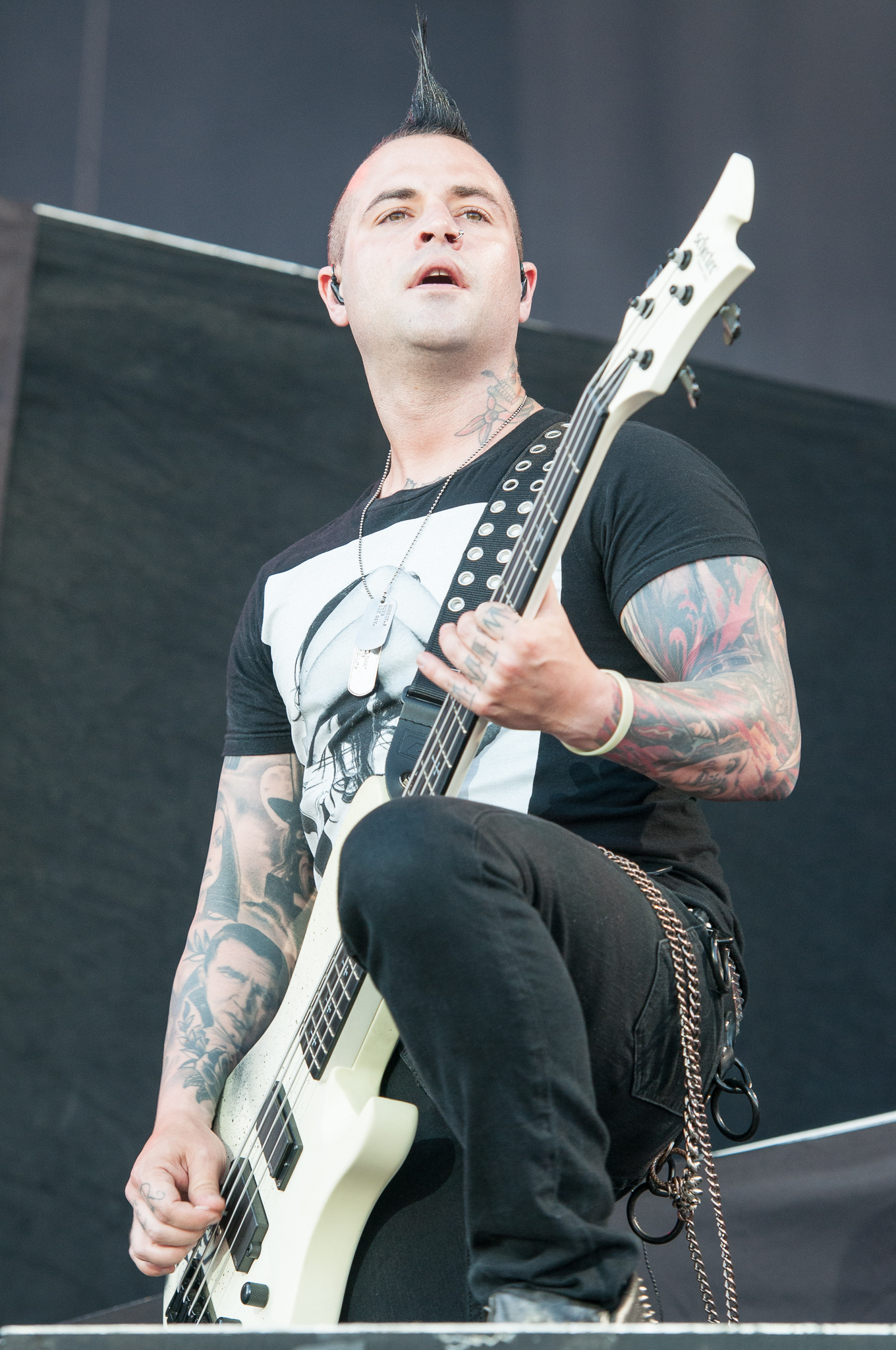 ARGO-Konzerte,Avenged Sevenfold,Johnny Christ,Jonathan Lewis Seward,Konzert,Livekonzert,Livemusik,Musik,RiP,Rock im Park 2014